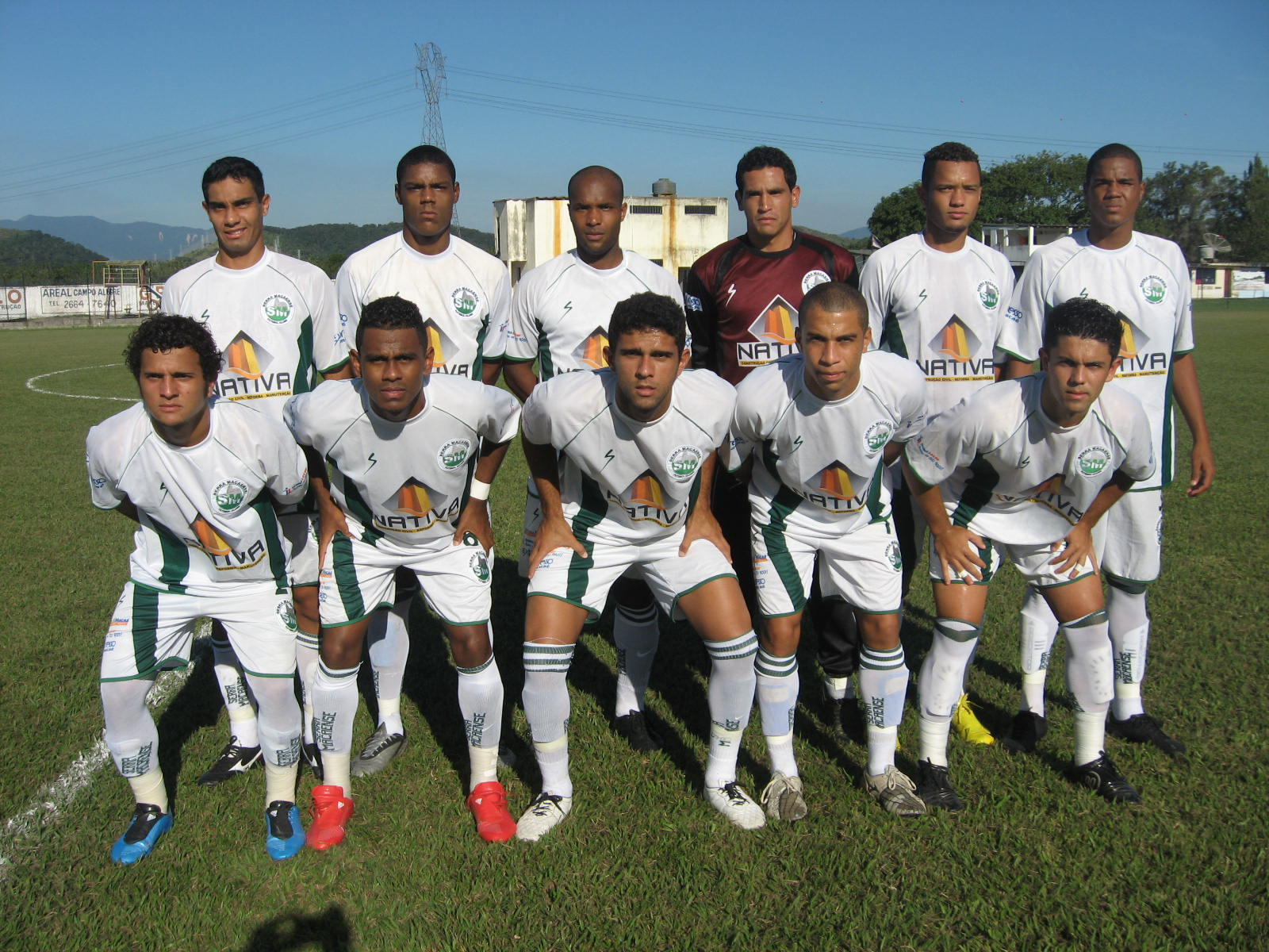 Equipe profissional do Serra Macaense em 2010.